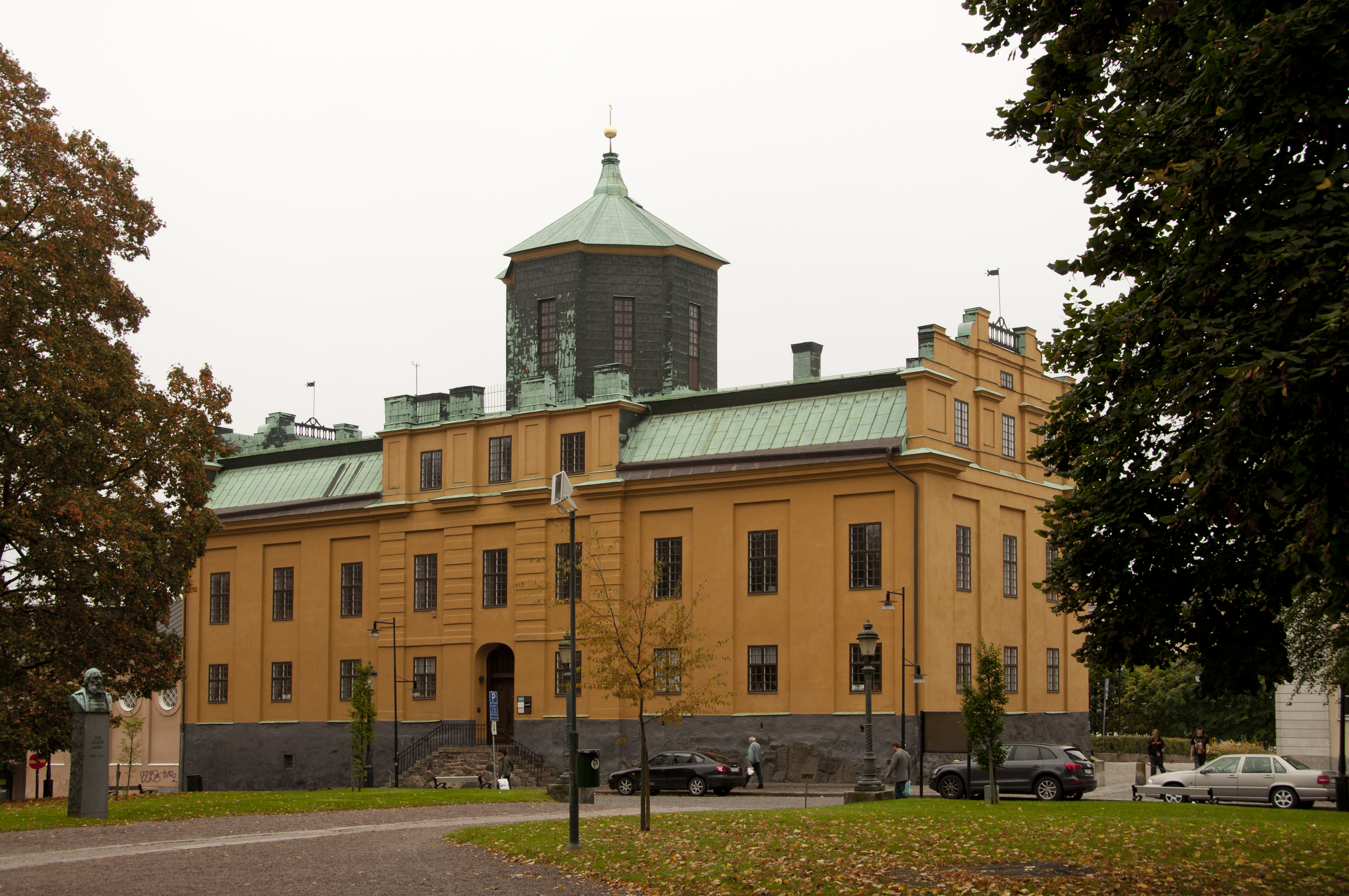 Gymnasium Adolpho-Fredericianum, Gamla Gymnasiet i Karlstad. Uppfört 1759, efter skiss av arkitekt Carl Hårleman under ledning av lektor Johan Fryxell.